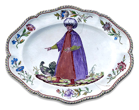 Vassoio in porcellana dipinto con la figura di un nobile turco. Ginori a Doccia 1745-50 c.